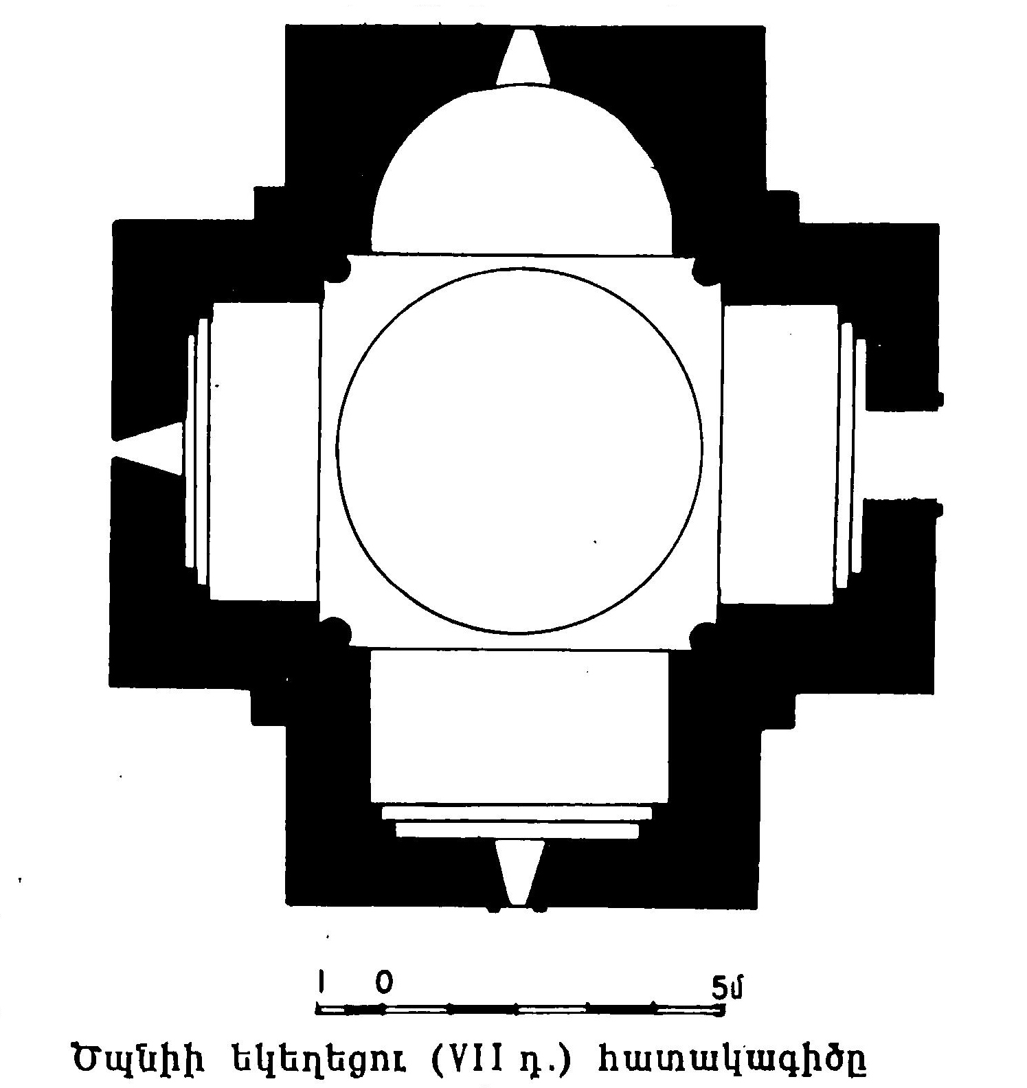 Ծպնիի եկեղեցու հատակագիծը